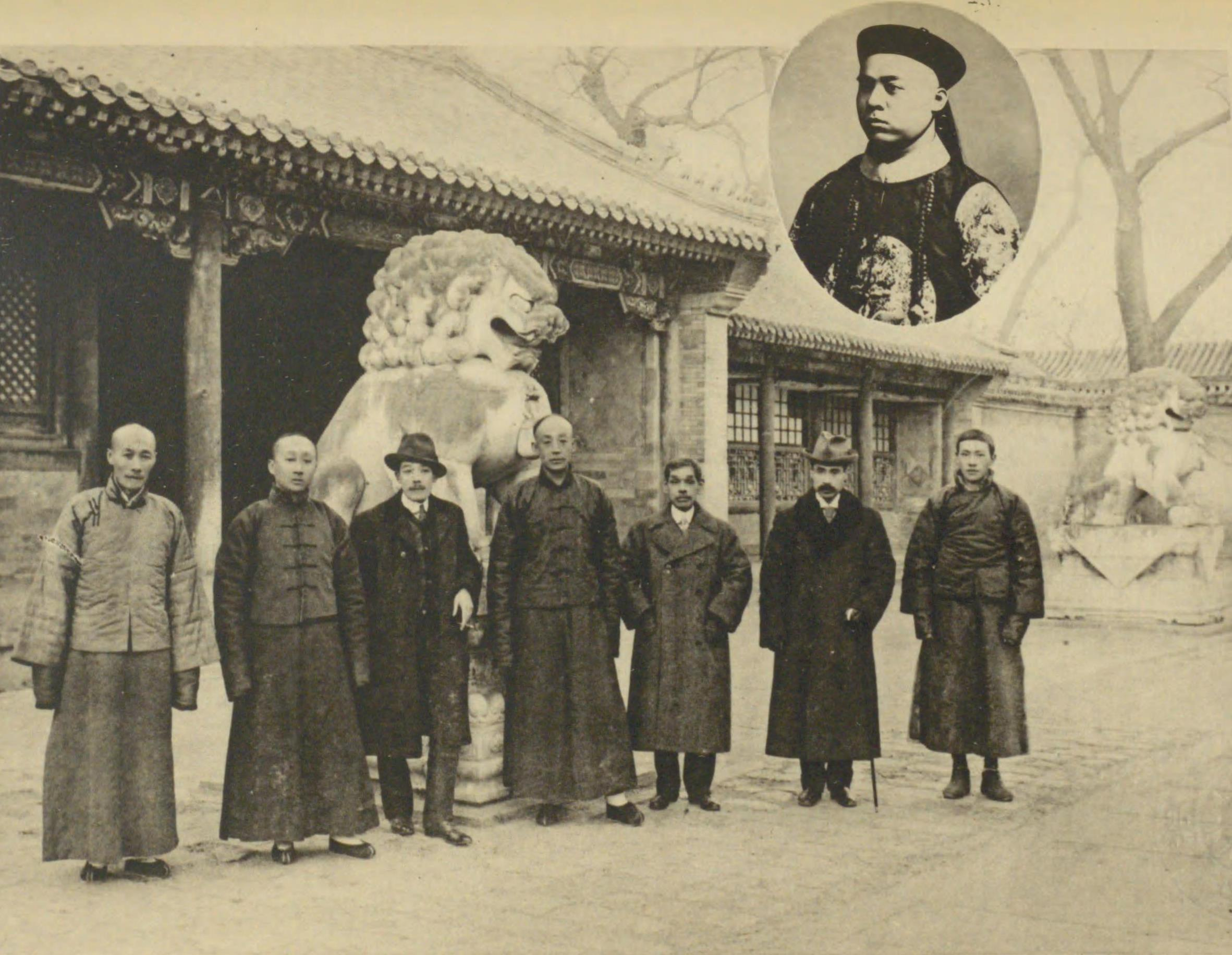 恭親王府正殿前 明治45年3月 （右より） 菅金福 山中六三郎 山中六三郎 親王府総務 劉恵郷 岡田友次 親王家執事 金雨三 同 陳顕建